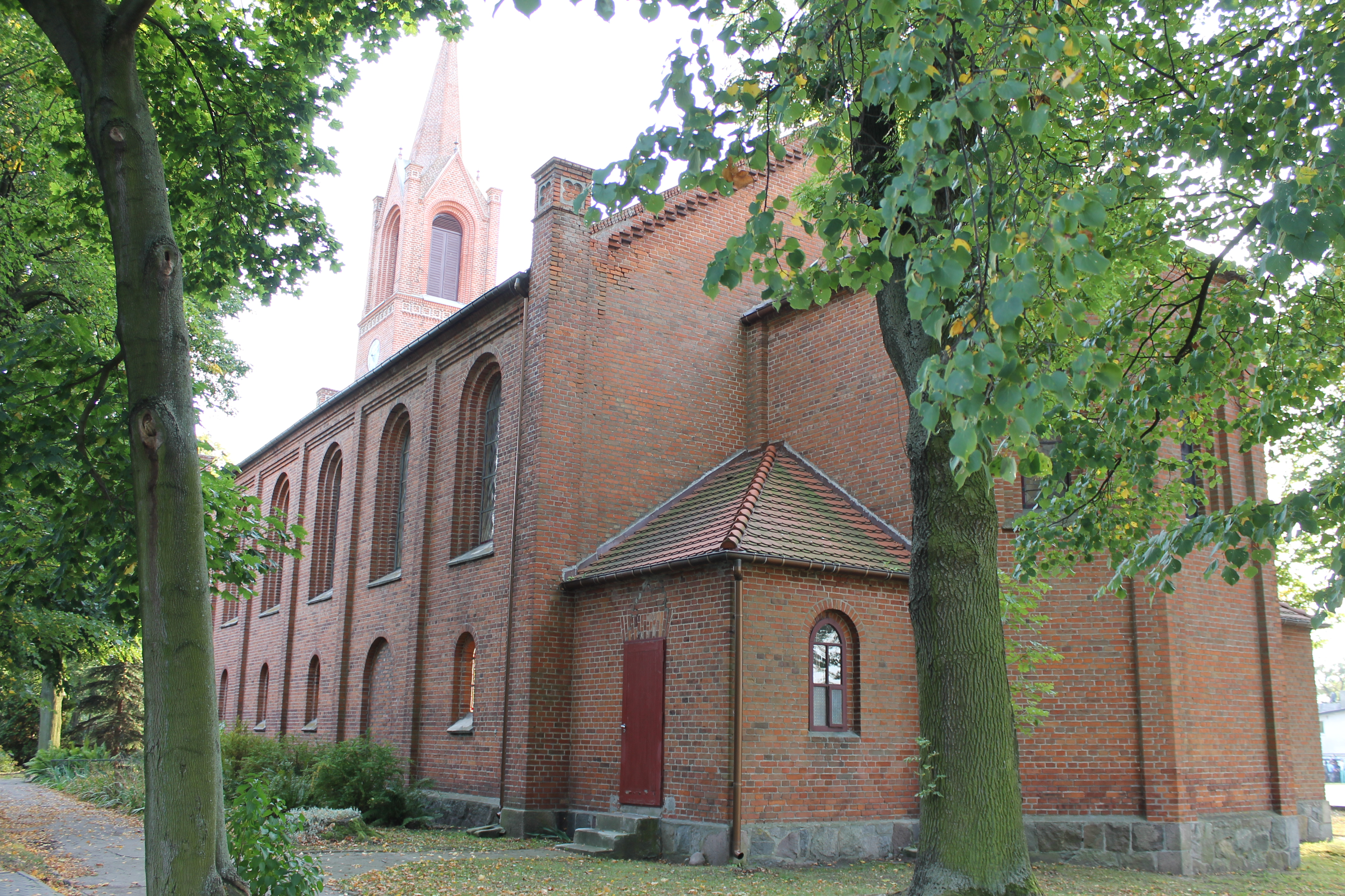 Książki, zespół kościoła ewangelickiego, ob. rzym.-kat. par. pw. Trójcy Św., 1868-1869